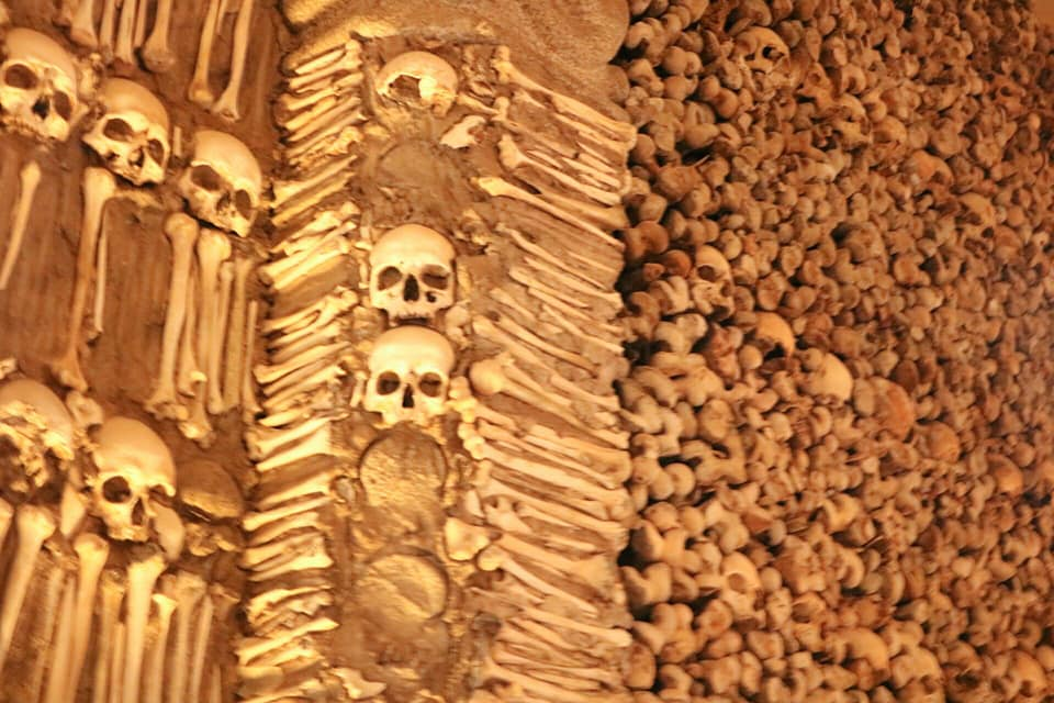 Visão da parede Interiore da Capela